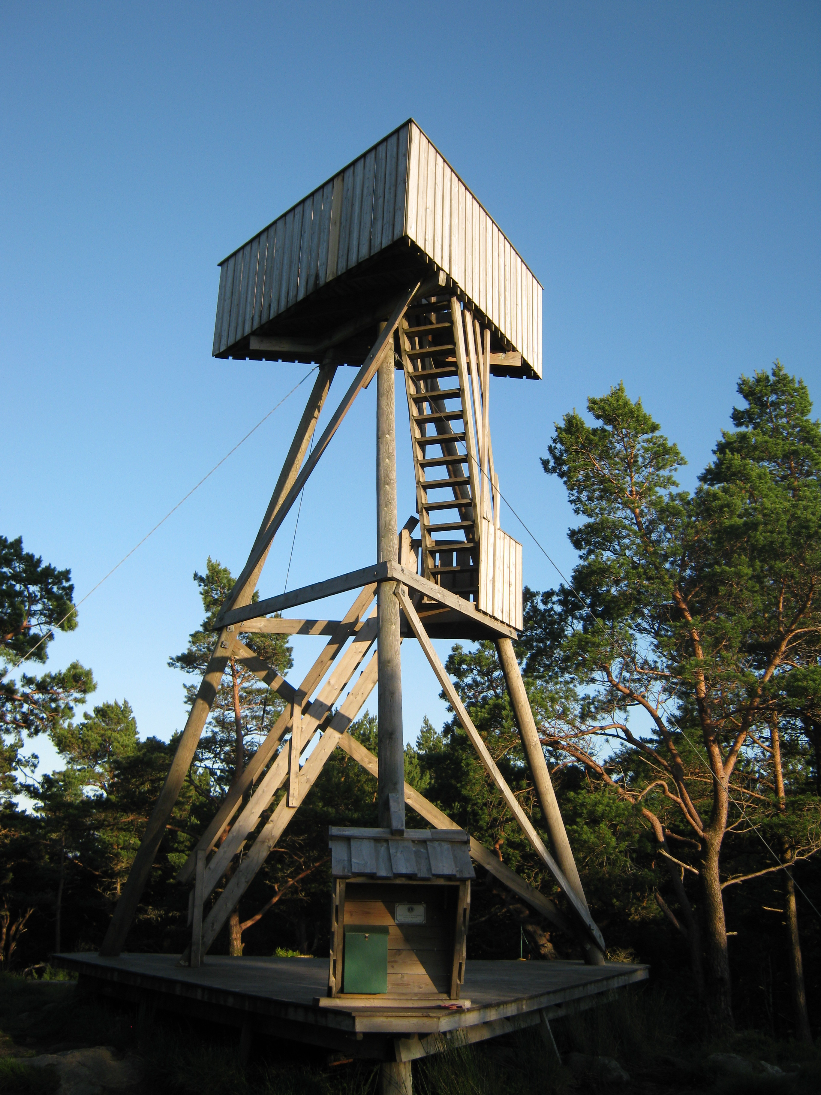 Utsiktstårn på toppen av Loddo, høyeste punkt i Austevoll kommune